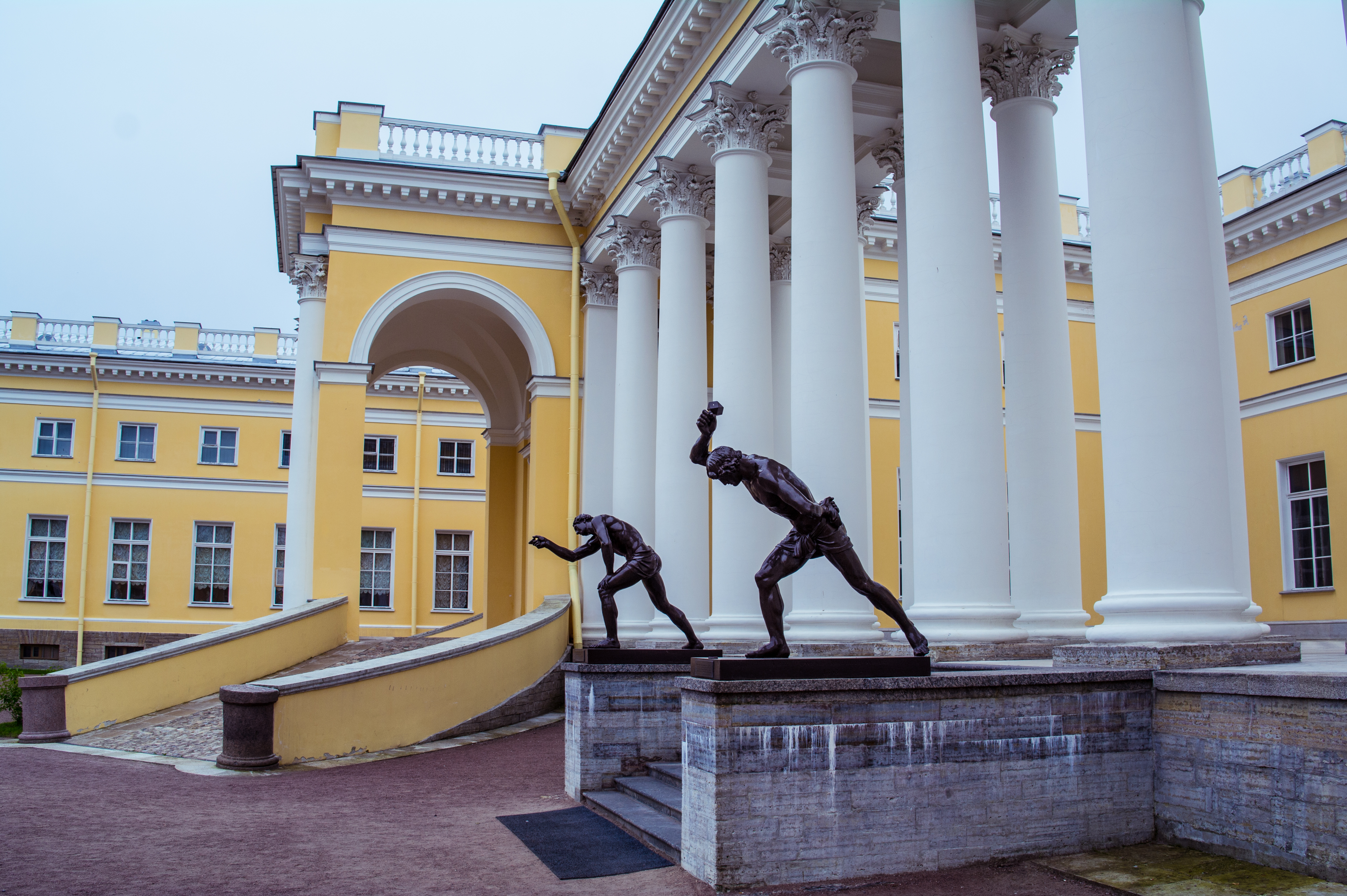 Царское Село. Александровский дворец. Скульптуры.